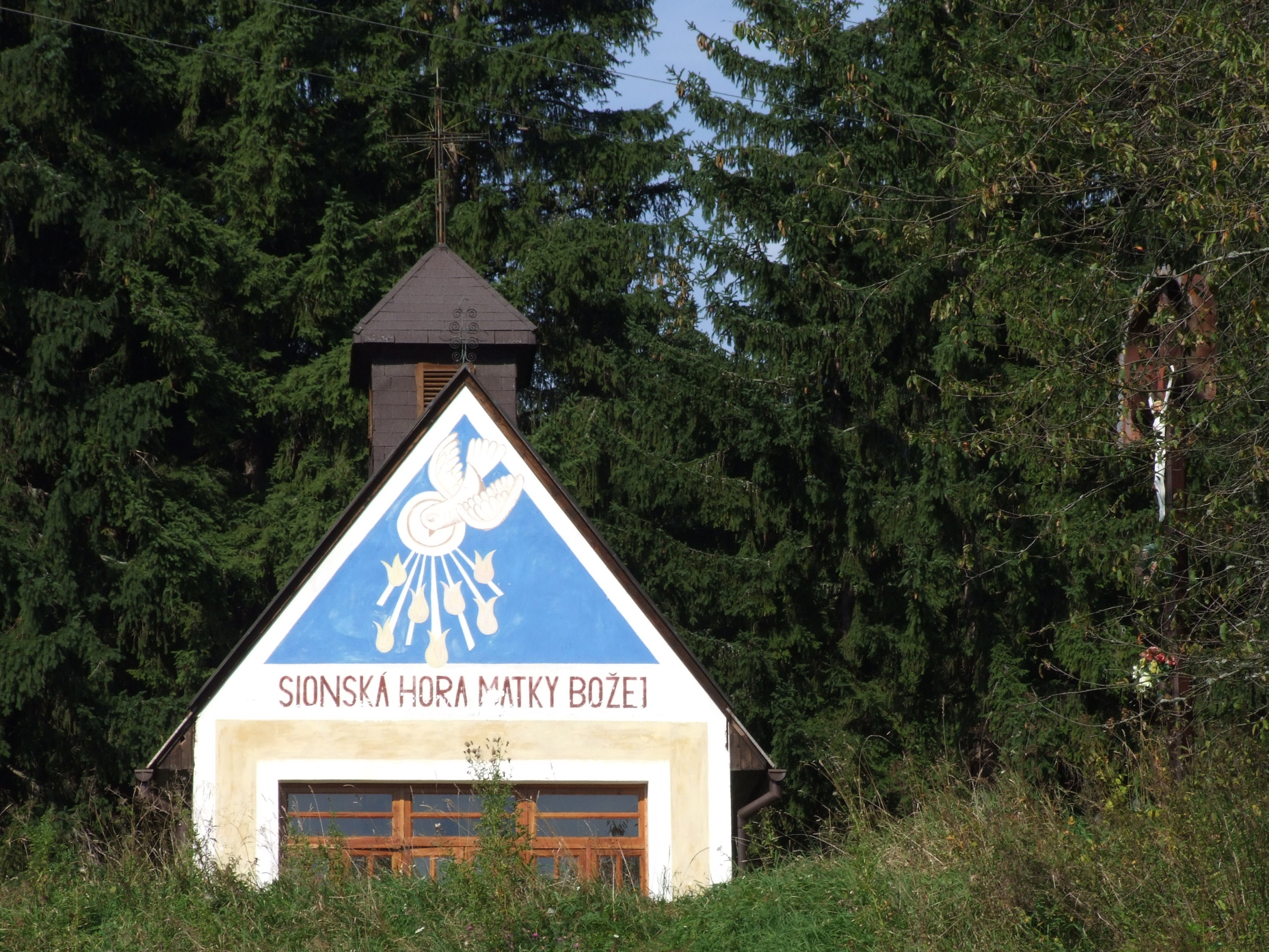 Kaplica Matki Boskiej u wylotu Doliny Jałowieckiej